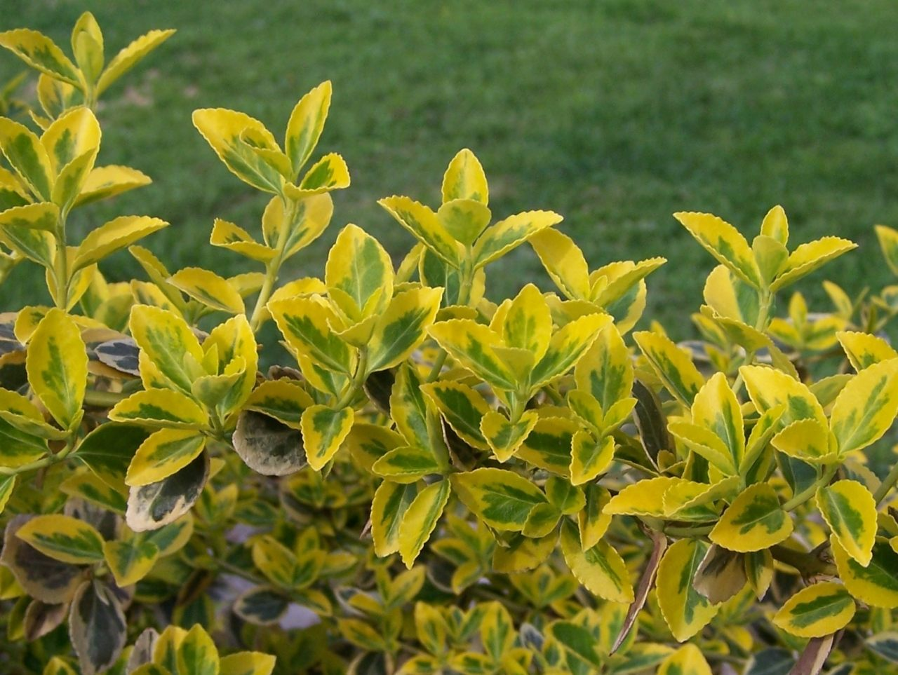 Euonymus fortunei `Emerald`n Gold` (pl. trzmielina Fortune`a)